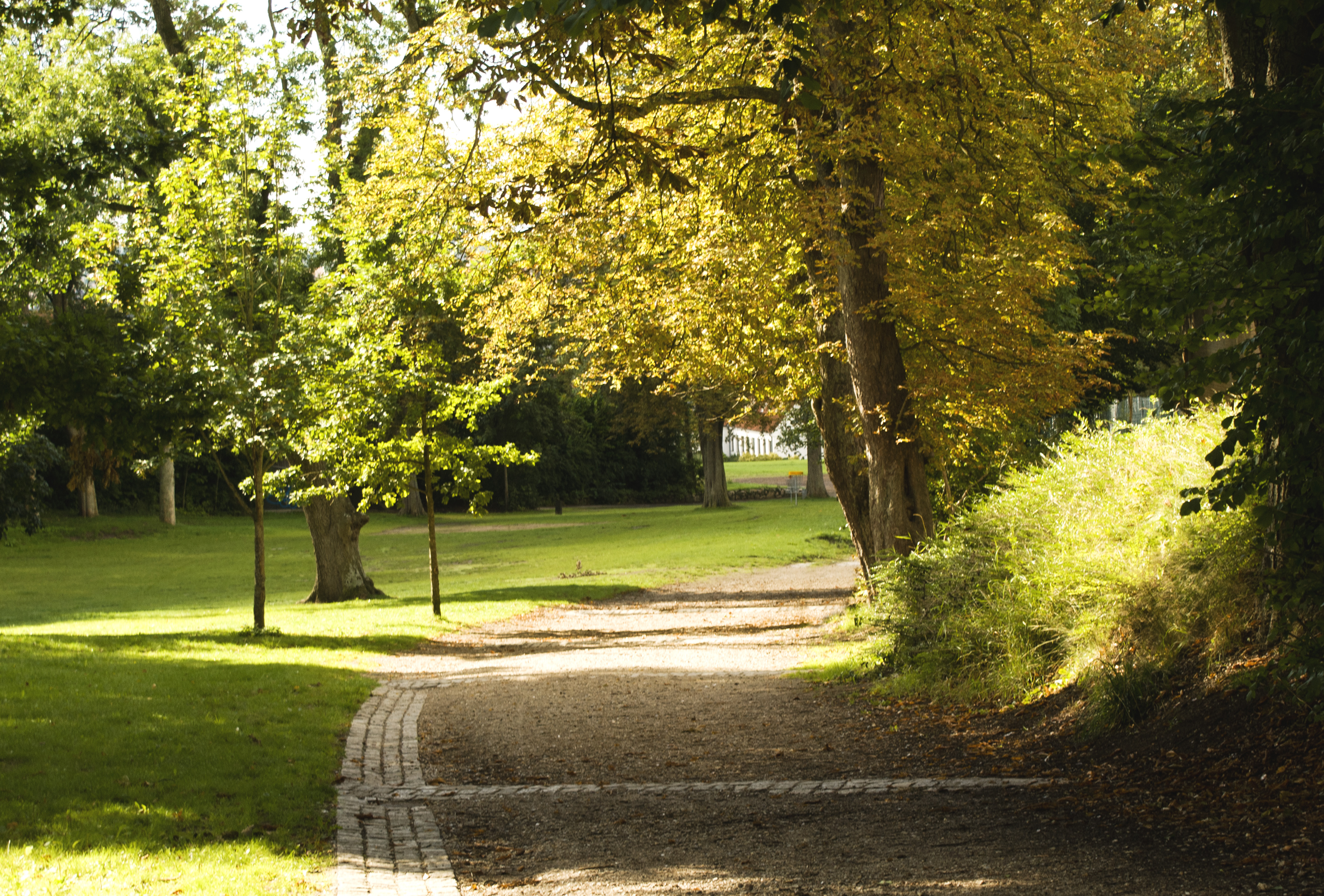 Den gamle hulvej i parken Kløften i Haderslev.